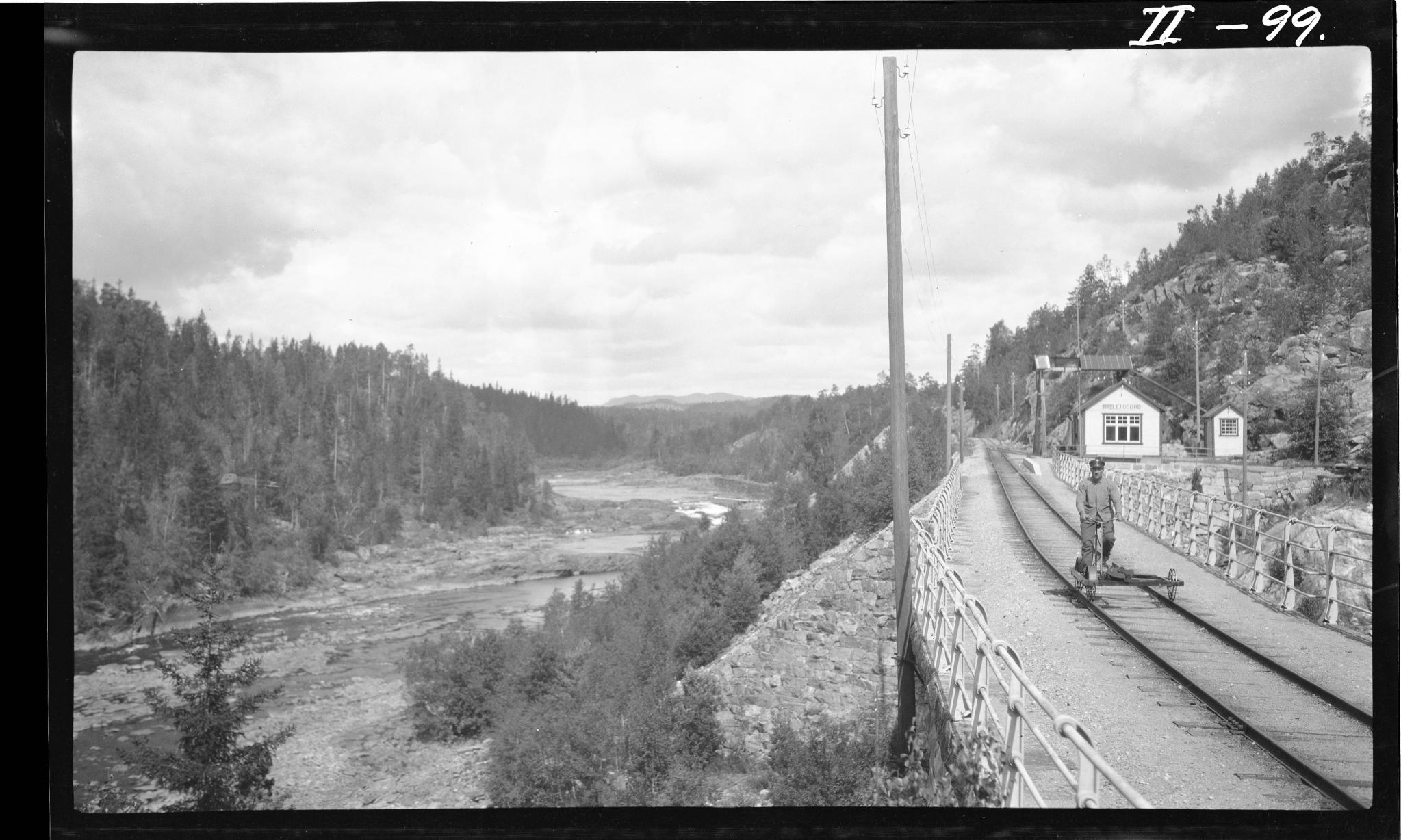 Kjenafoss Bøylefossbru station. Hydrologisk avdeling. Dato: 02.08.1923